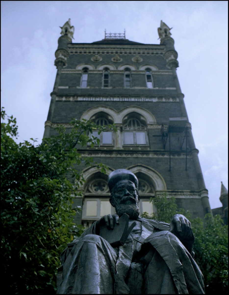 Nikon FM2, Nikkor 35mm f/2, Kodak Portra 400NC